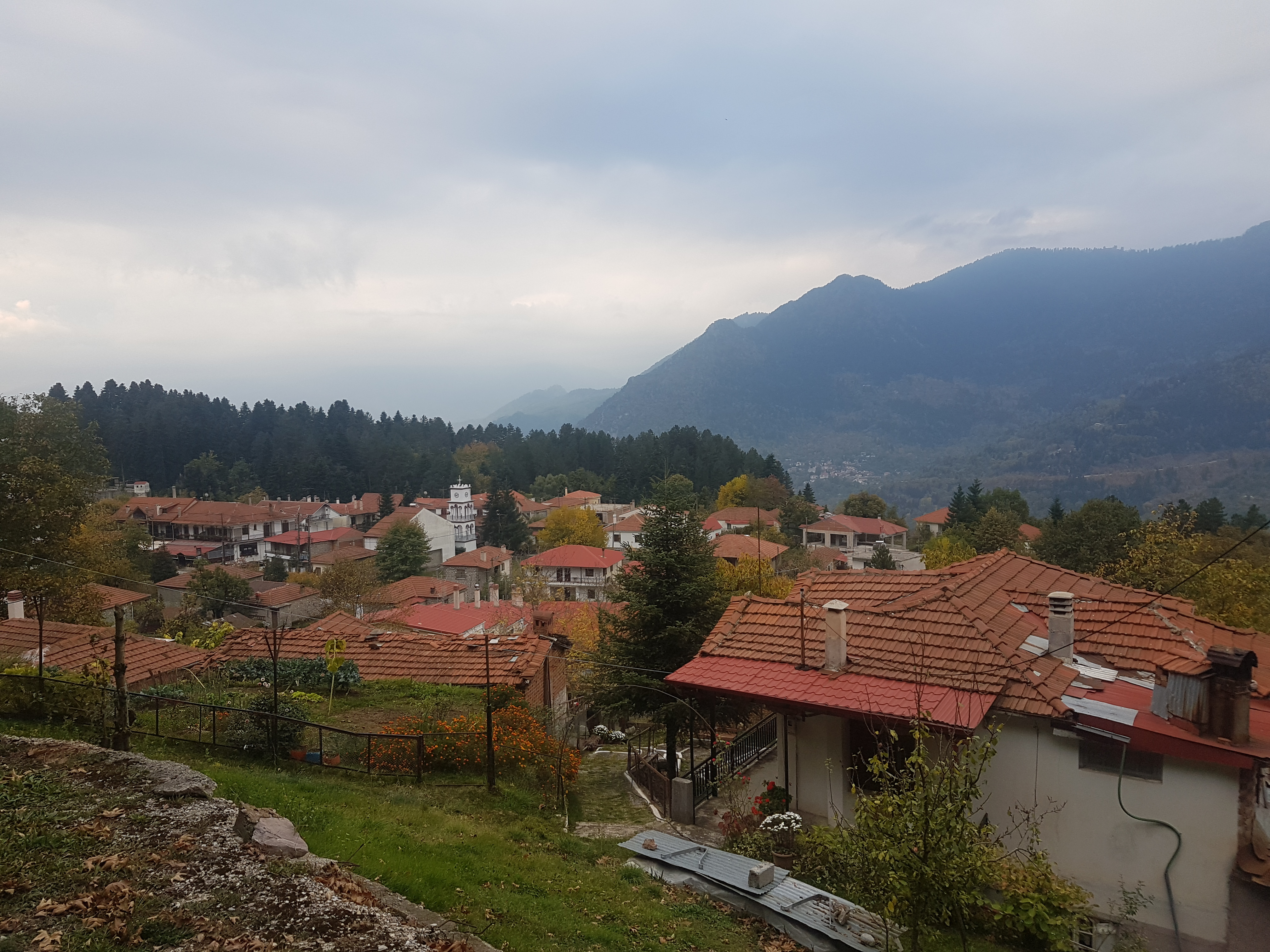 Ελάτη Τρικάλων, θέα του χωριού, 2018